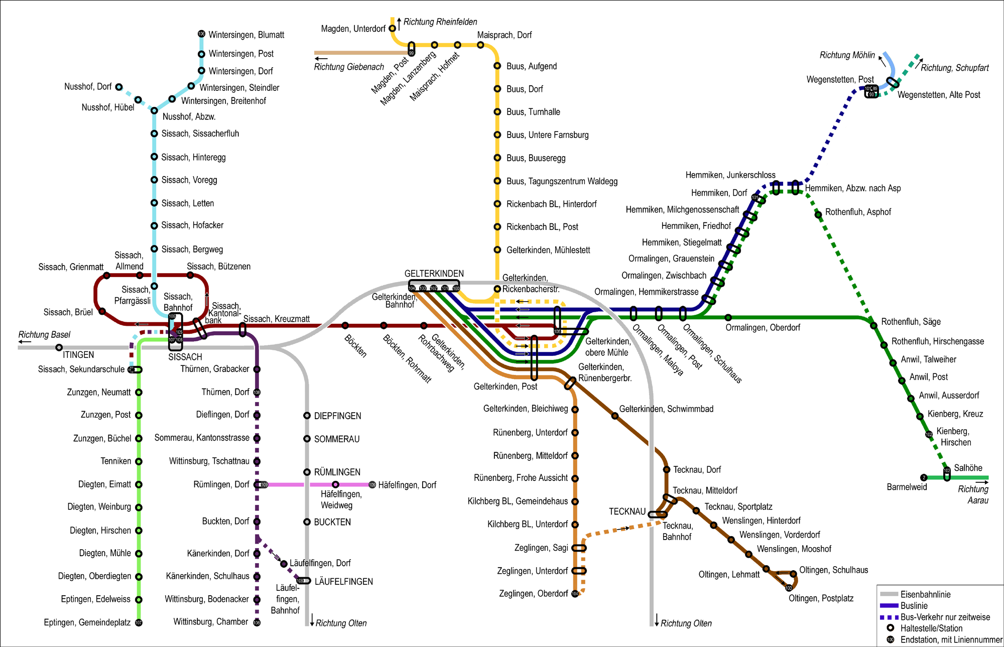 öV-Linien Bahn und Bus im Bezirk Sissach, Basellandschaft, Schweiz